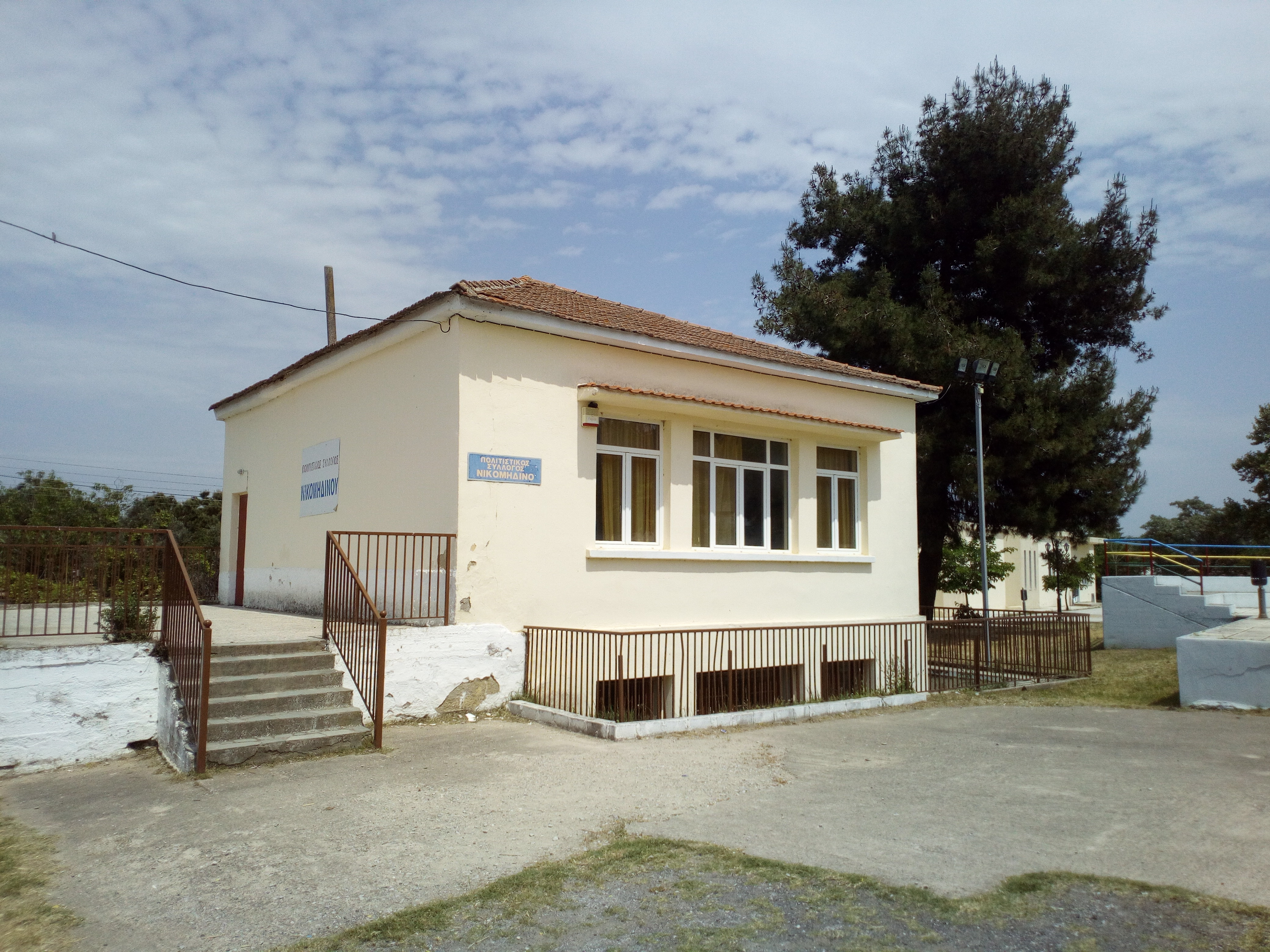 Ο πολιτιστικός σύλλογος του Νικομηδινού.